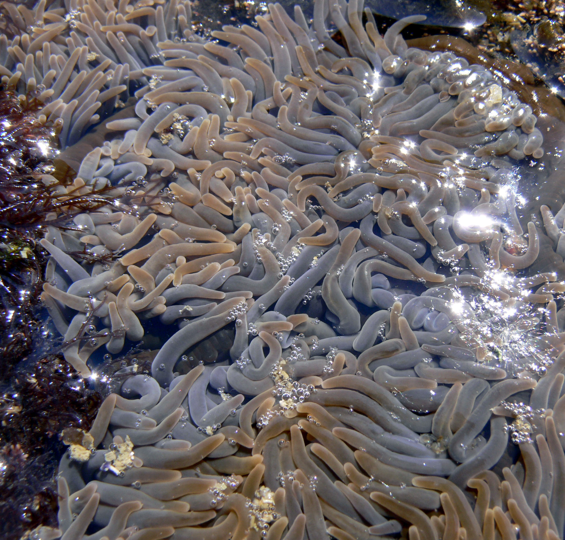 rAnémone de mer, Bretagne sud (Baie de Quiberon)